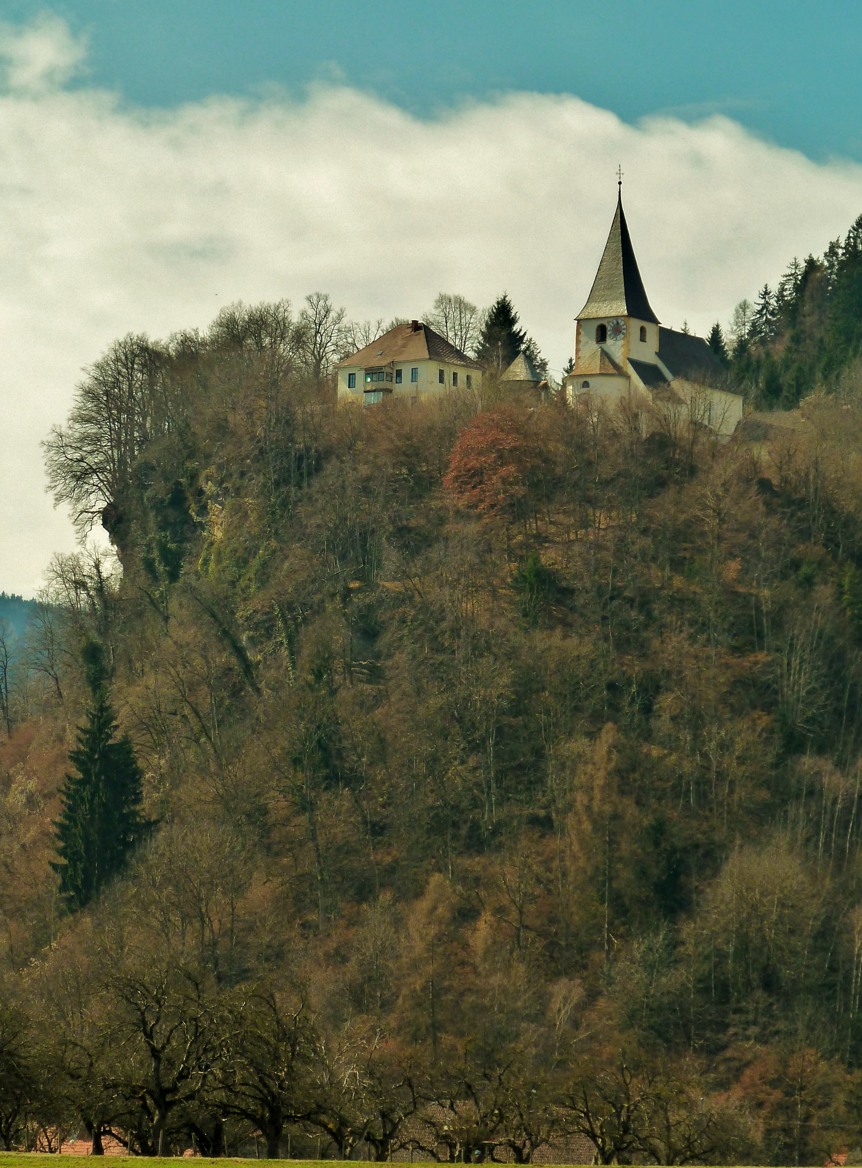 Tiffen, Pfarrkirche und Pfarrhof auf einem Felsen oberhalb des Ortes